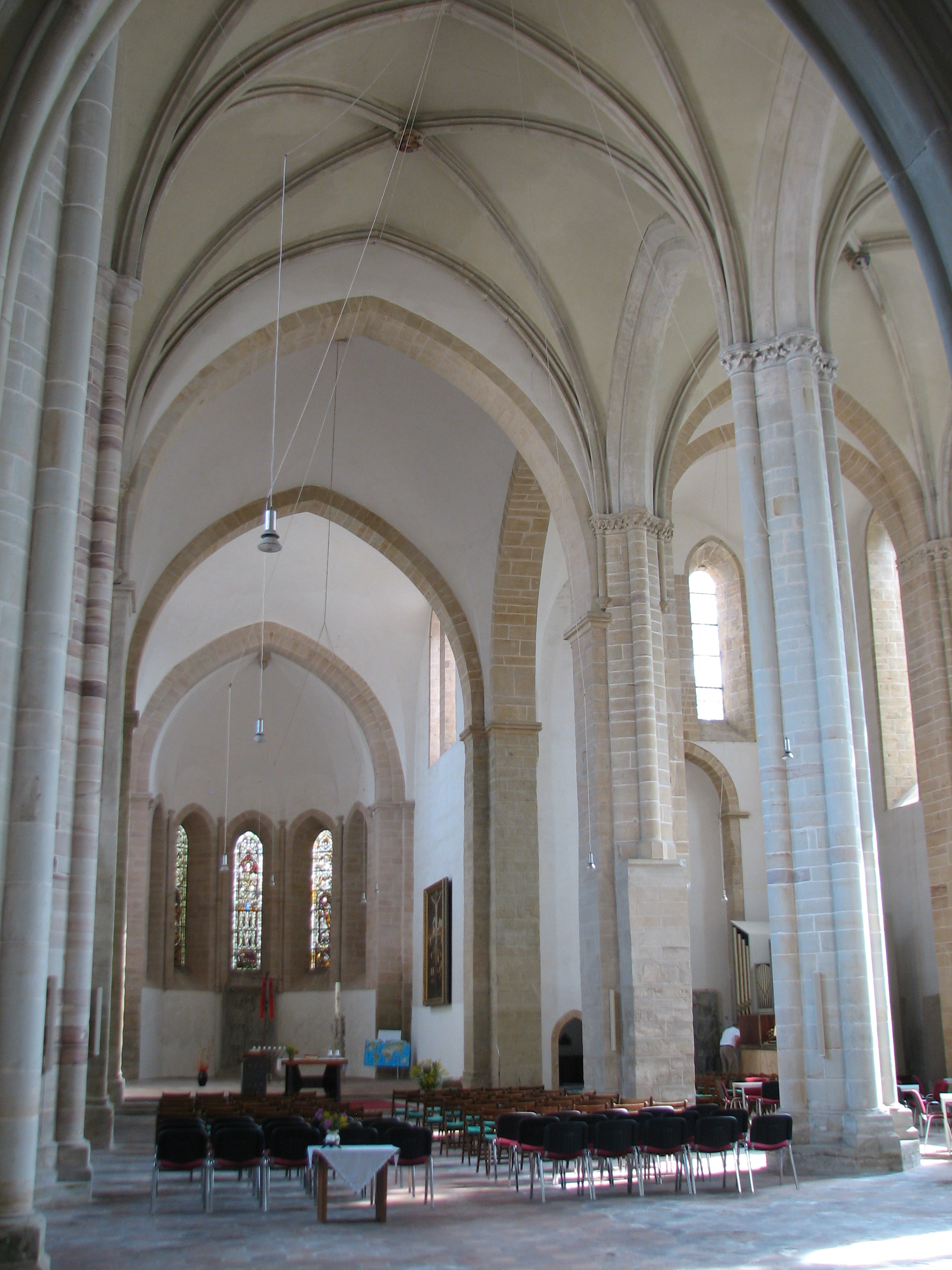 Klosterkirche St. Marien und St. Cyprian, Blick ins Kirchenschiff